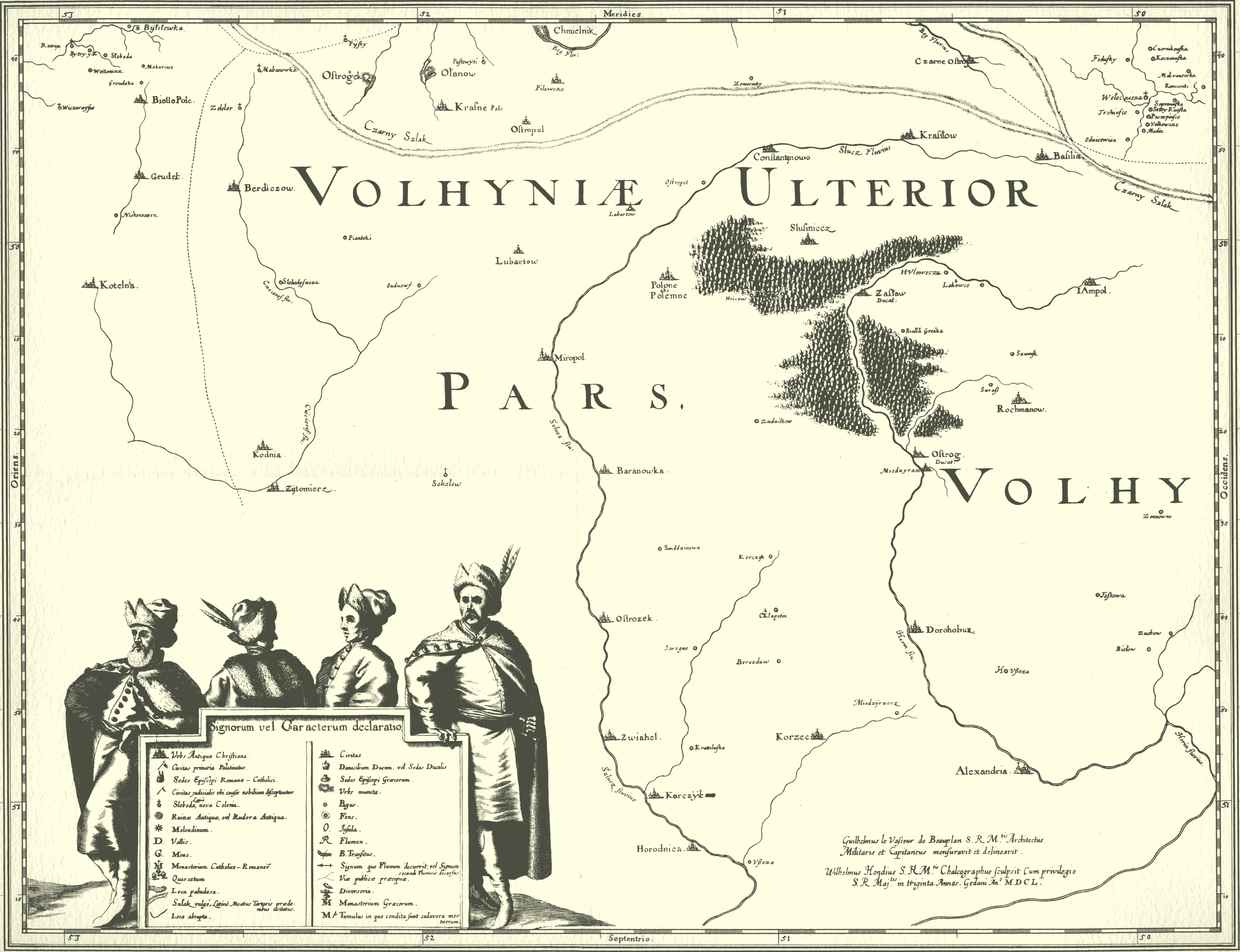 Фрагмент из альбома «Общий план Диких полей, проще говоря Украйны», («Delineatio Generalis Camporum Desertorum vulgo Ukraina»), 1650 год, внимание, на данной карте юг вверху, а север внизу, де Боплан, 1650